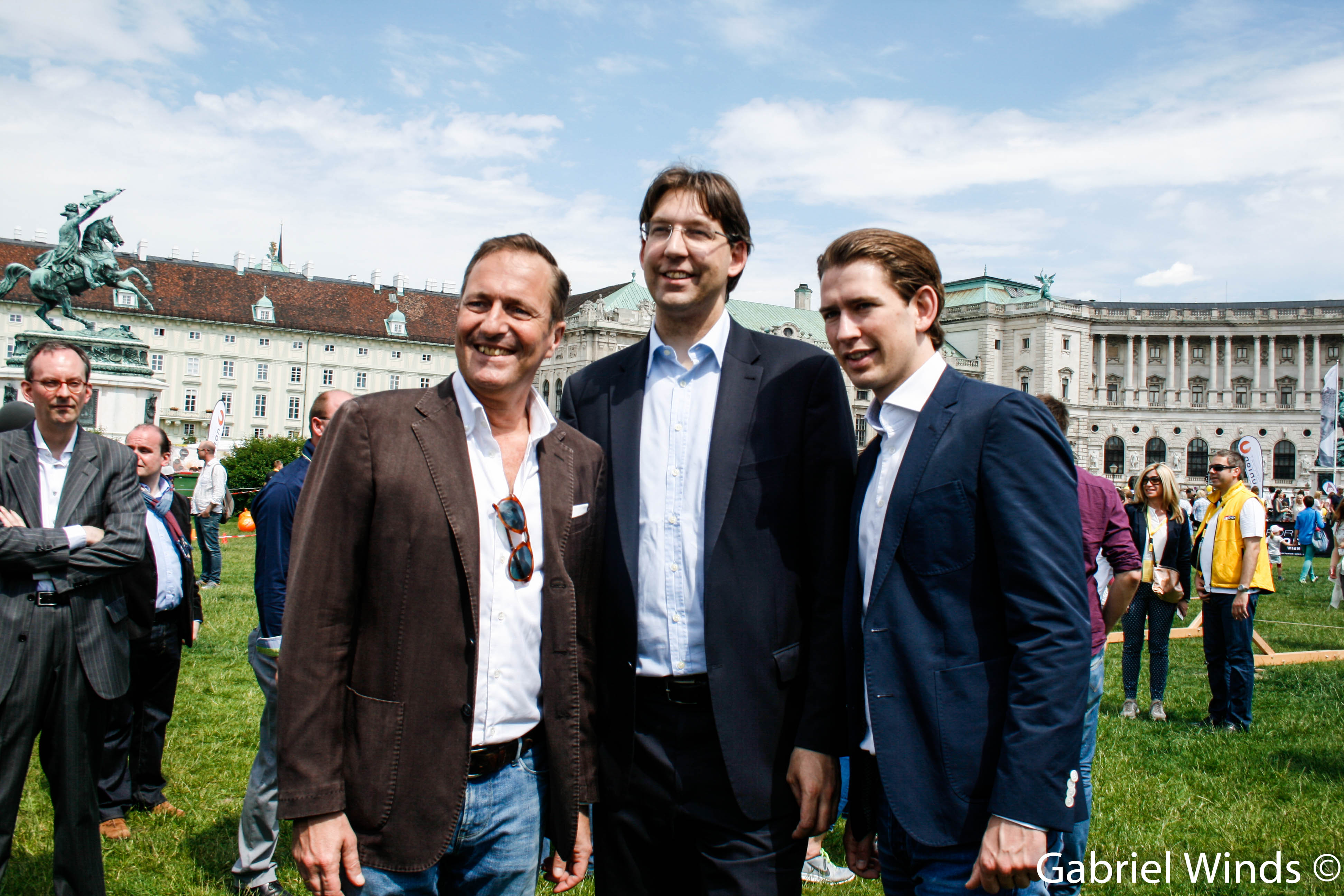 (c)Junge ÖVP/Gabriel Winds